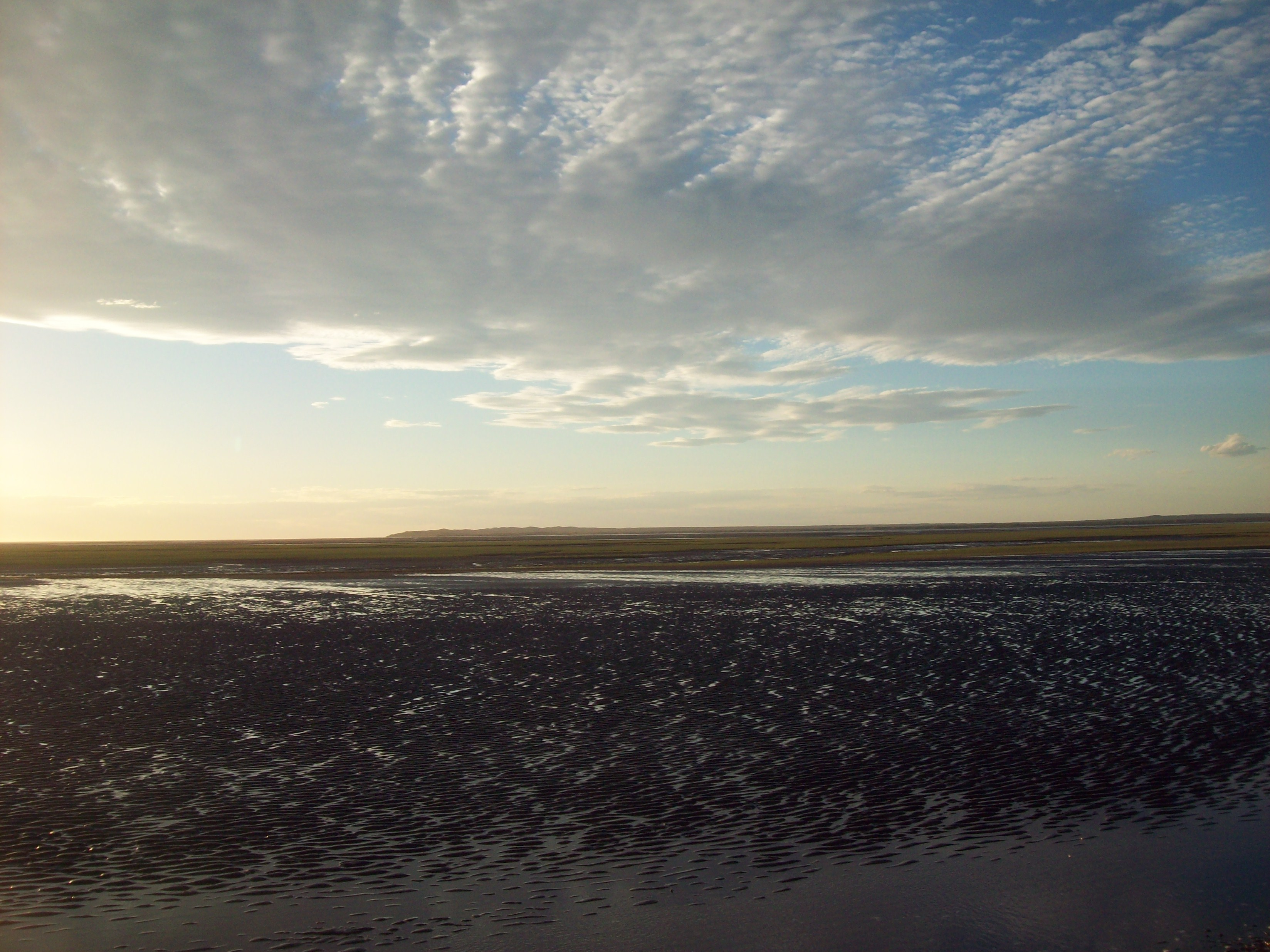 Zona de espartillar en Caleta de Los loros.